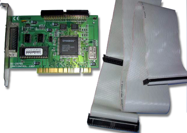 SCSI-3 DC-2975U Controller von Dawi Control mit Symbios Logic Chipsatz, 50-Pin SCSI Kabel für interne Geräte